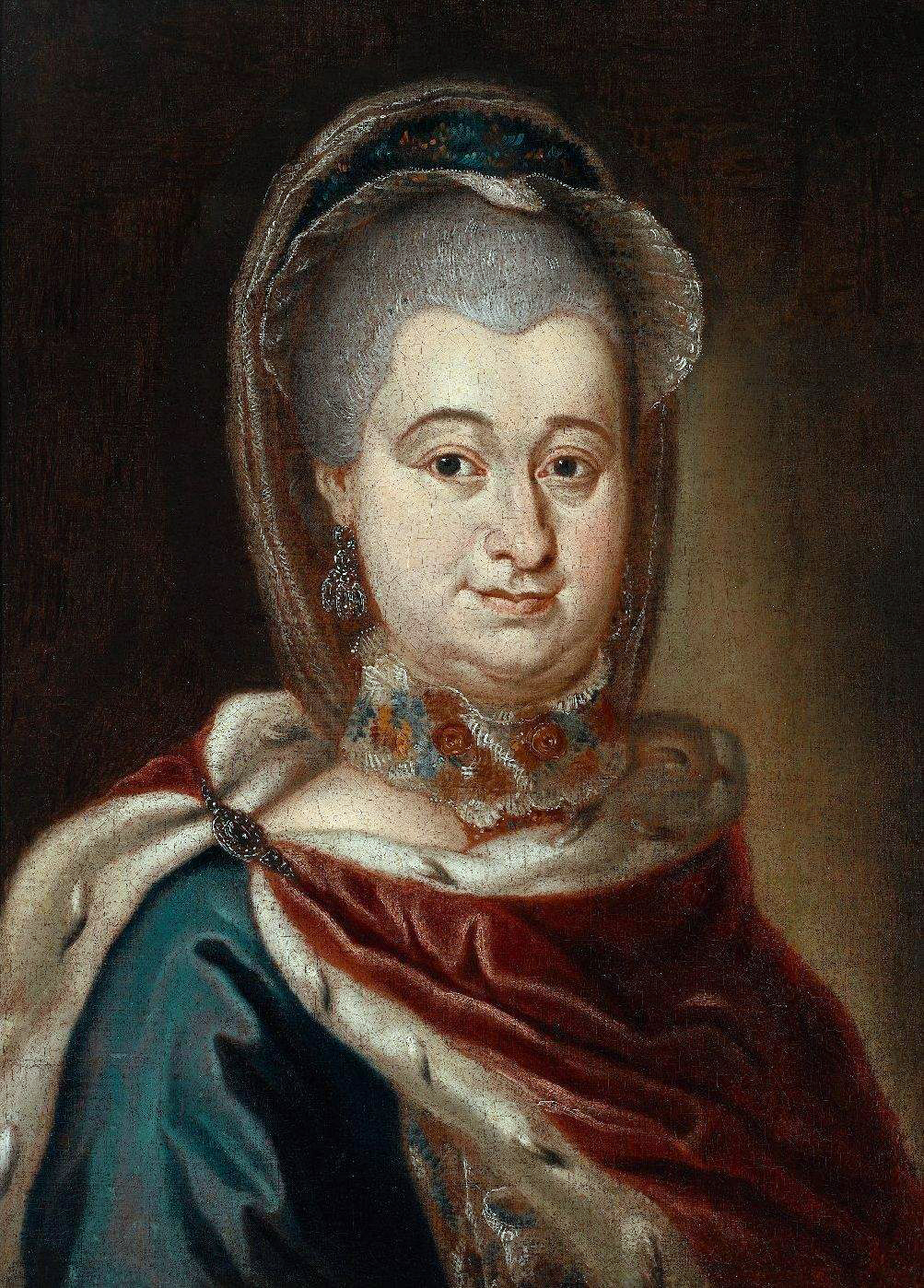 Беларуская (тарашкевіца): Партрэт Ганны Людвікі Радзівіл (Hanna Ludvika Radzivił) з роду Мыцельскіх (Mycielski)